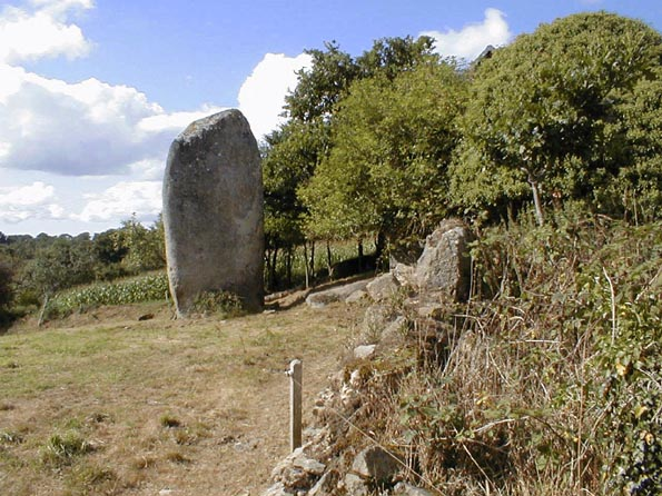 Tregrom. Peulven Kerskot